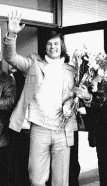 ADN-ZB-Mittelstädt-19.11.78-B-Berlin: Rückkehr von Dean Reed- Dem bekannten Sänger, Schauspieler und Friedenskämpfer Dean Reed (2.v.l.) wurde heute auf dem Flughafen Berlin-Schönfeld bei seiner Rückkehr in die DDR ein herzlicher Empfang zuteil. Links Hartmut König, Sektretär des Zentralrates der FDJ.- Reed der zusammen mit anderen während einer Farmer Demonstration verhaftet worden war, mußte vom Gericht in Buffalo auf Grund der Haltlosigkeit der Anklage und auch unter dem Eindruck der internationalen Proteste freigesprochen werden.